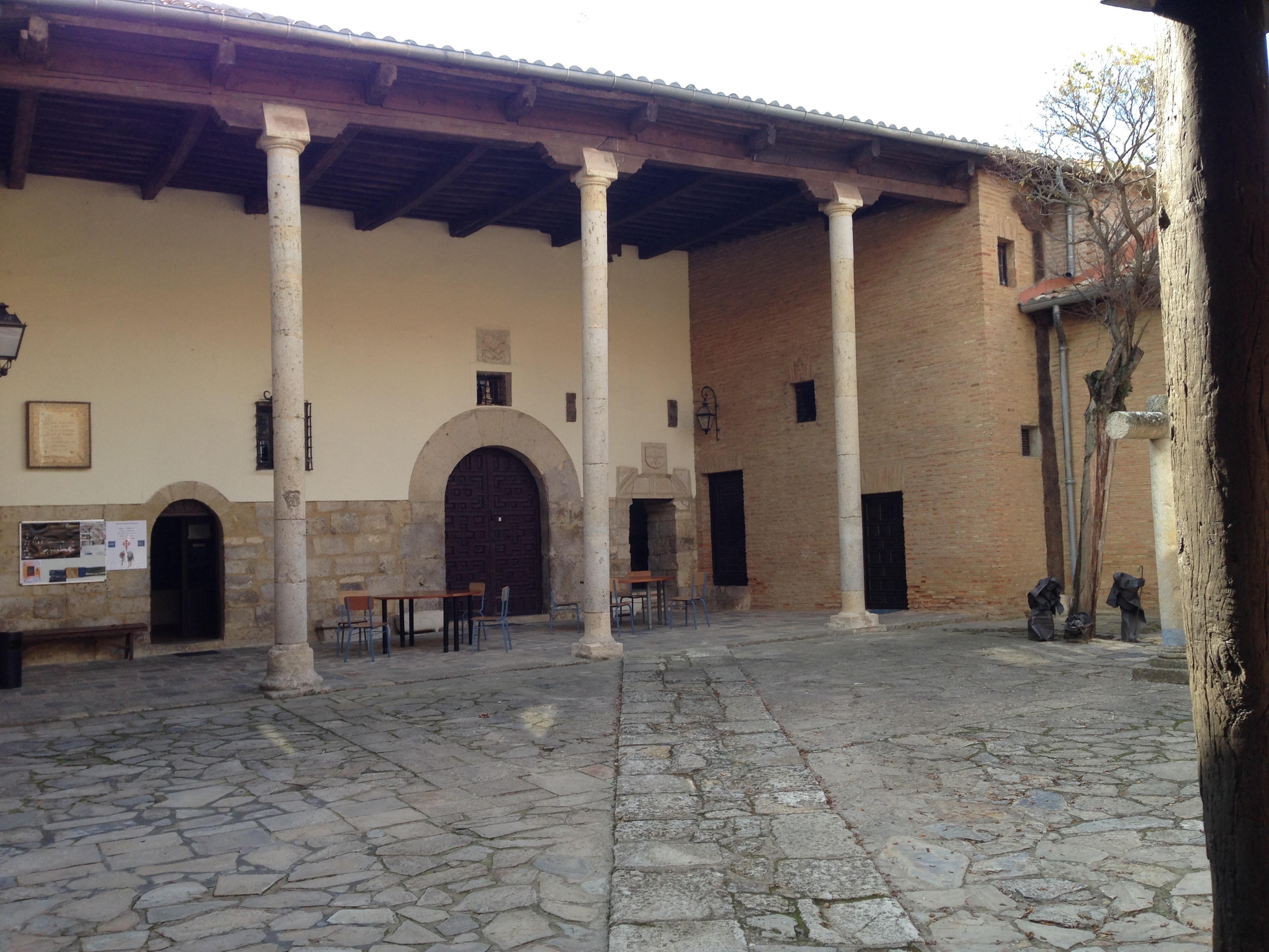 Dziedziniec w klasztorze Św. Klary w miejscowości Carrion de los Condes (prowincja Palencia, region Kastylia i Leon, Hiszpania)